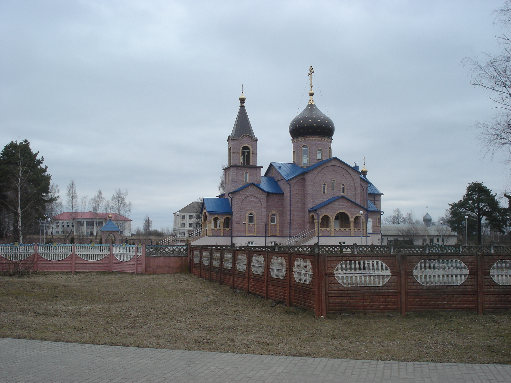 Беларуская (тарашкевіца): Мар’іна Горка (Marjina Horka)